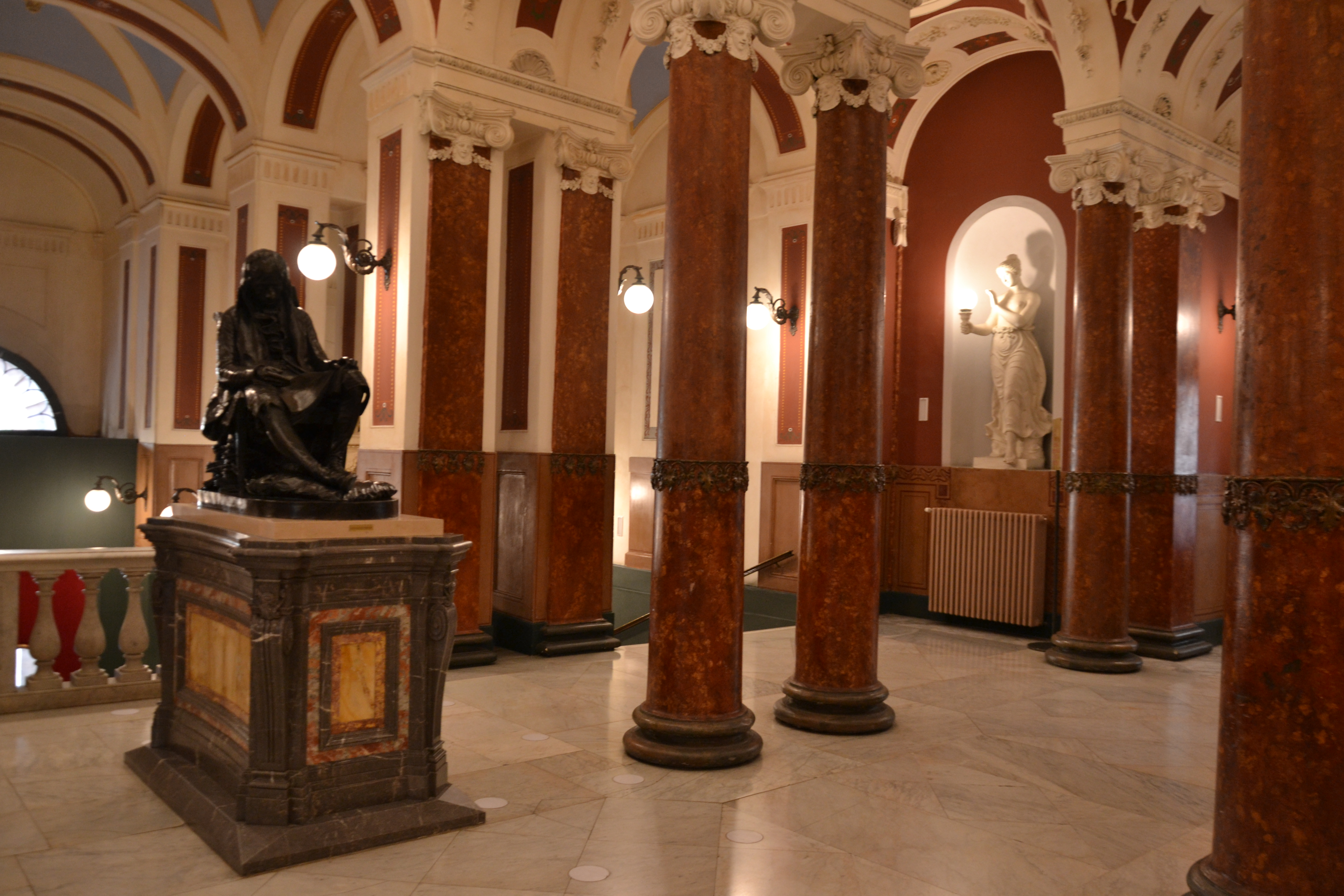 Ingresso teatro Verdi Salerno